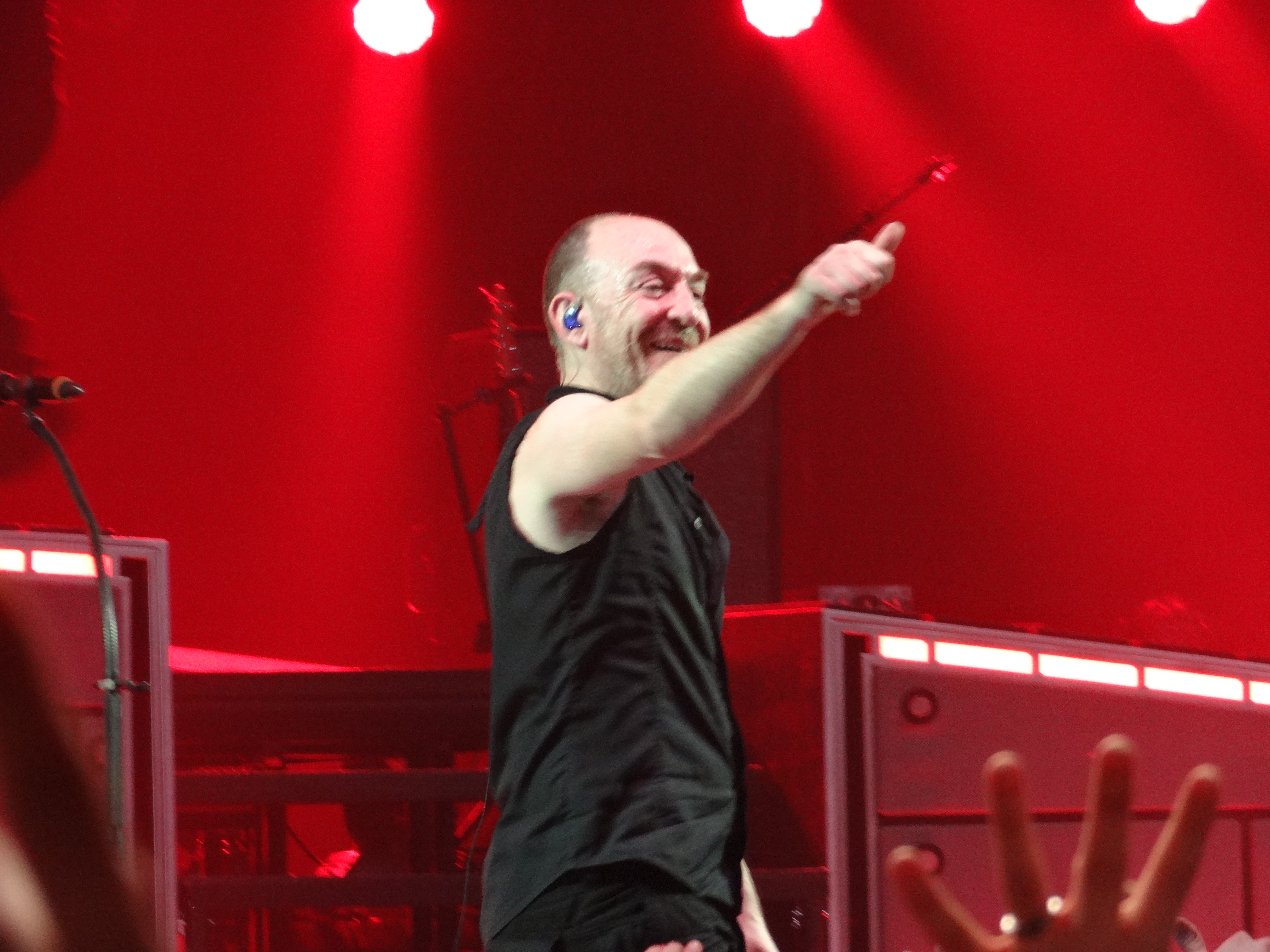 François Soulier lors du concert d'Indochine le 23 mars 2013 à Brest.